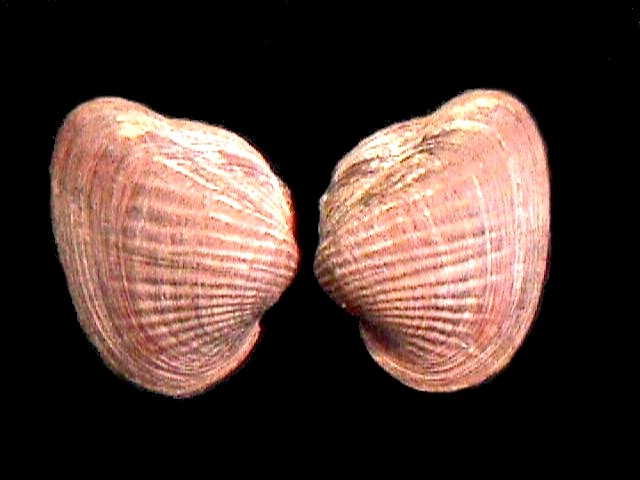 Castalia schombergiana (Bivalvia: Unionoida: Hyriidae del rio Ventuari, estado Amazonas - Venezuela)